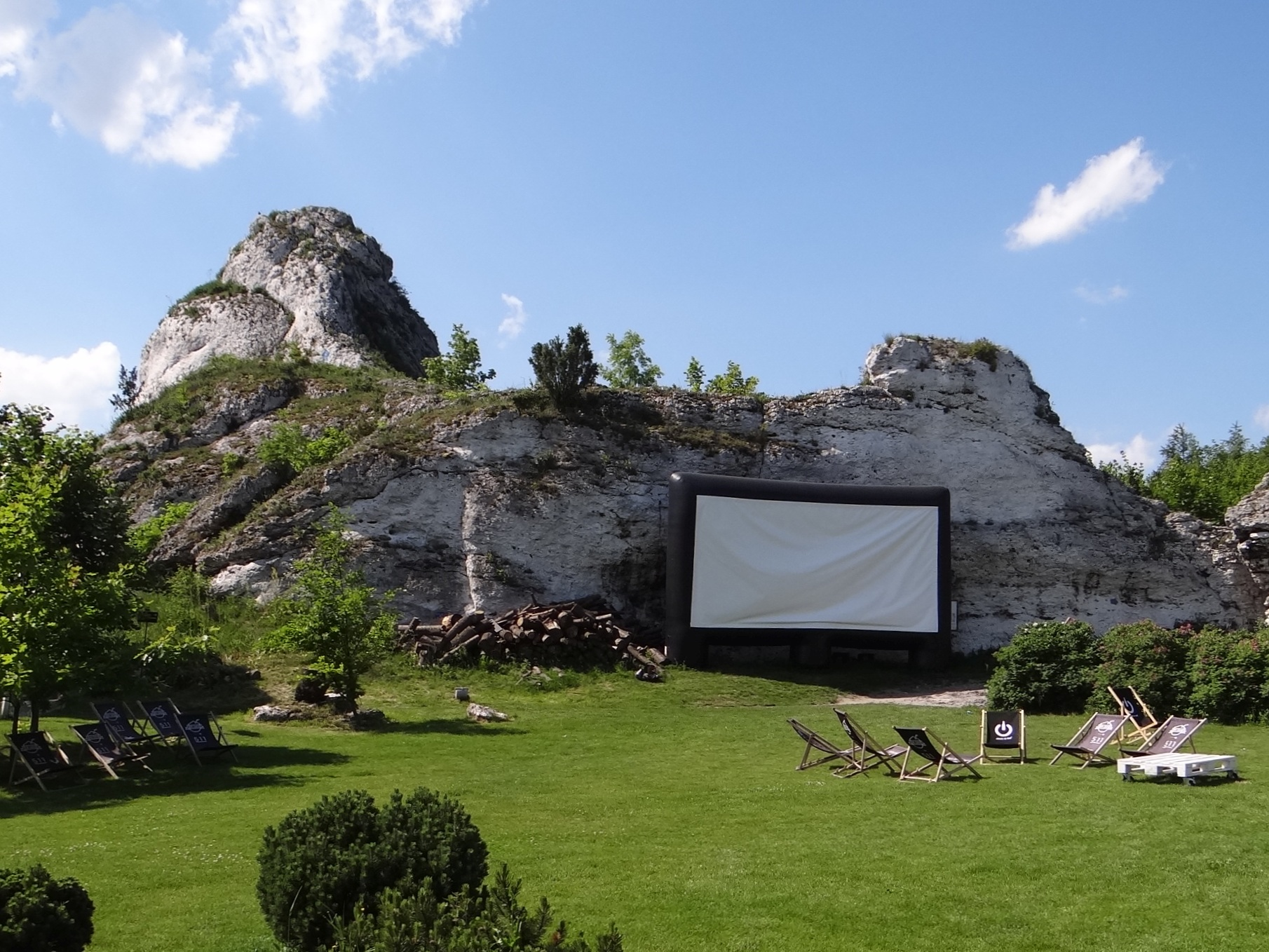 Skały Bigos i Wrota w Podzamczu. Widok od strony hotelu. Z tyłu Czubatka